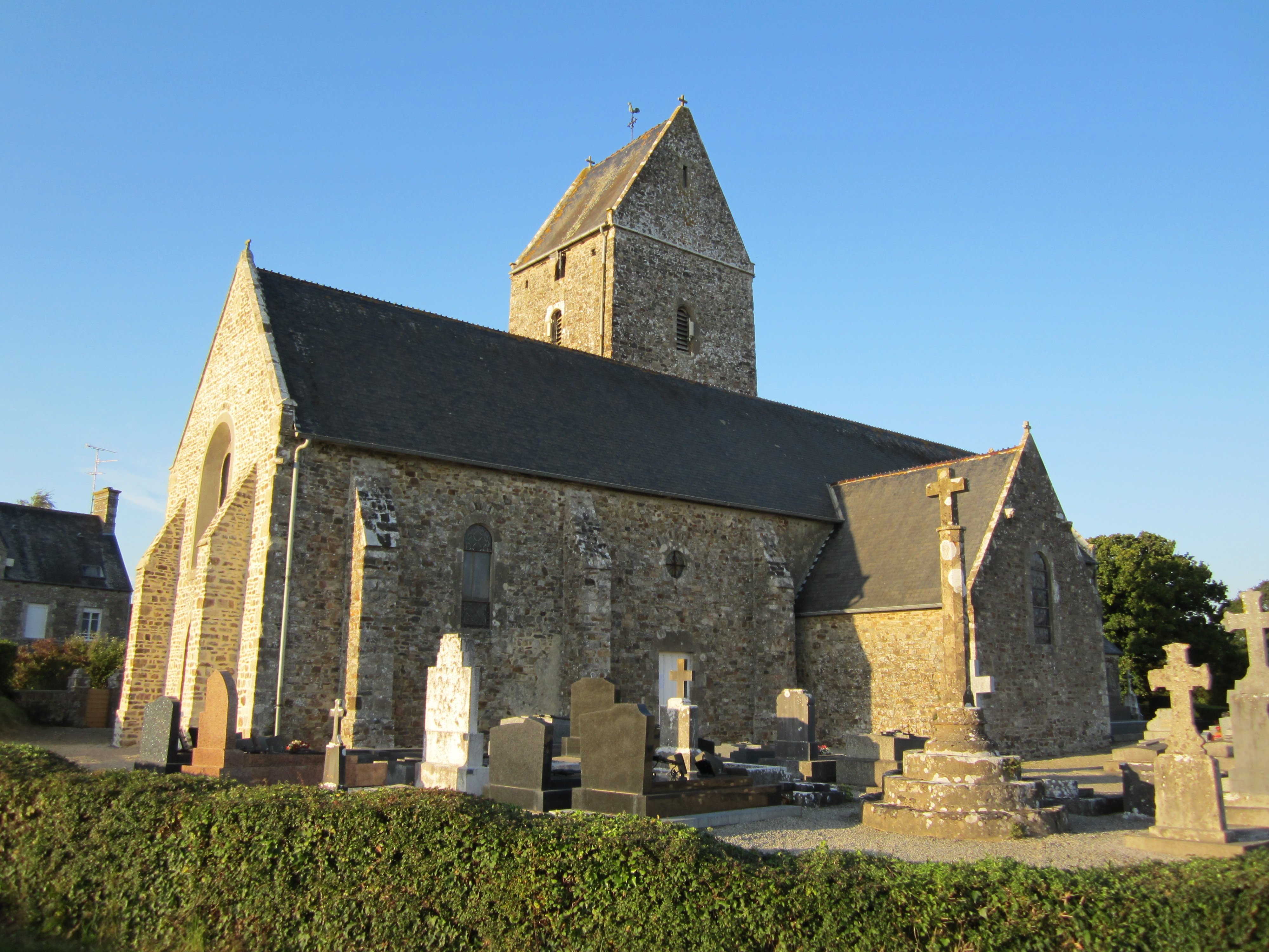 Église Saint-Ouen de Catteville